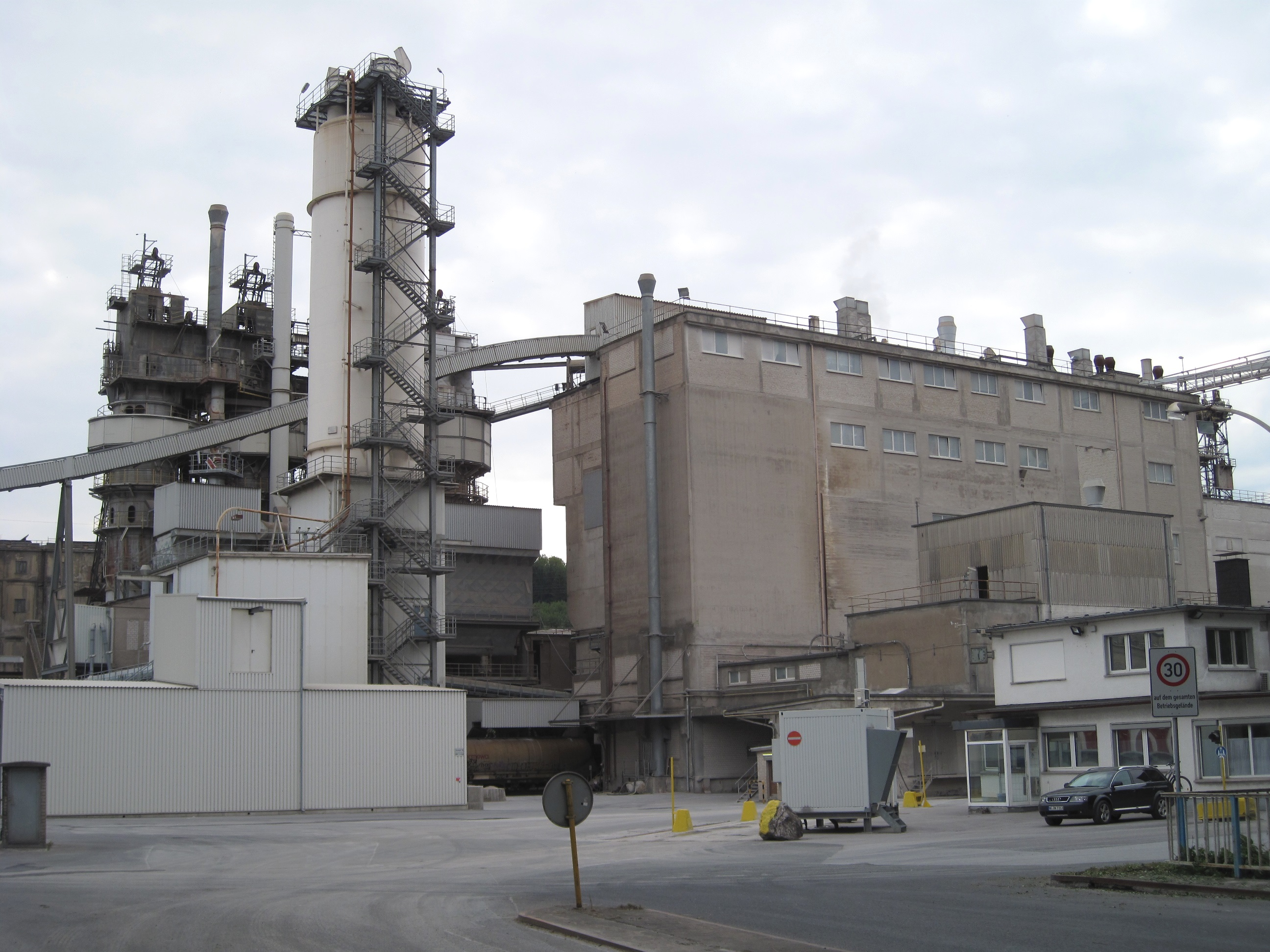 Rheinkalk-Werk Hönnetal (Schachtofenanlage) in Menden-Oberrödinghausen (Versand, Einfahrt 1).